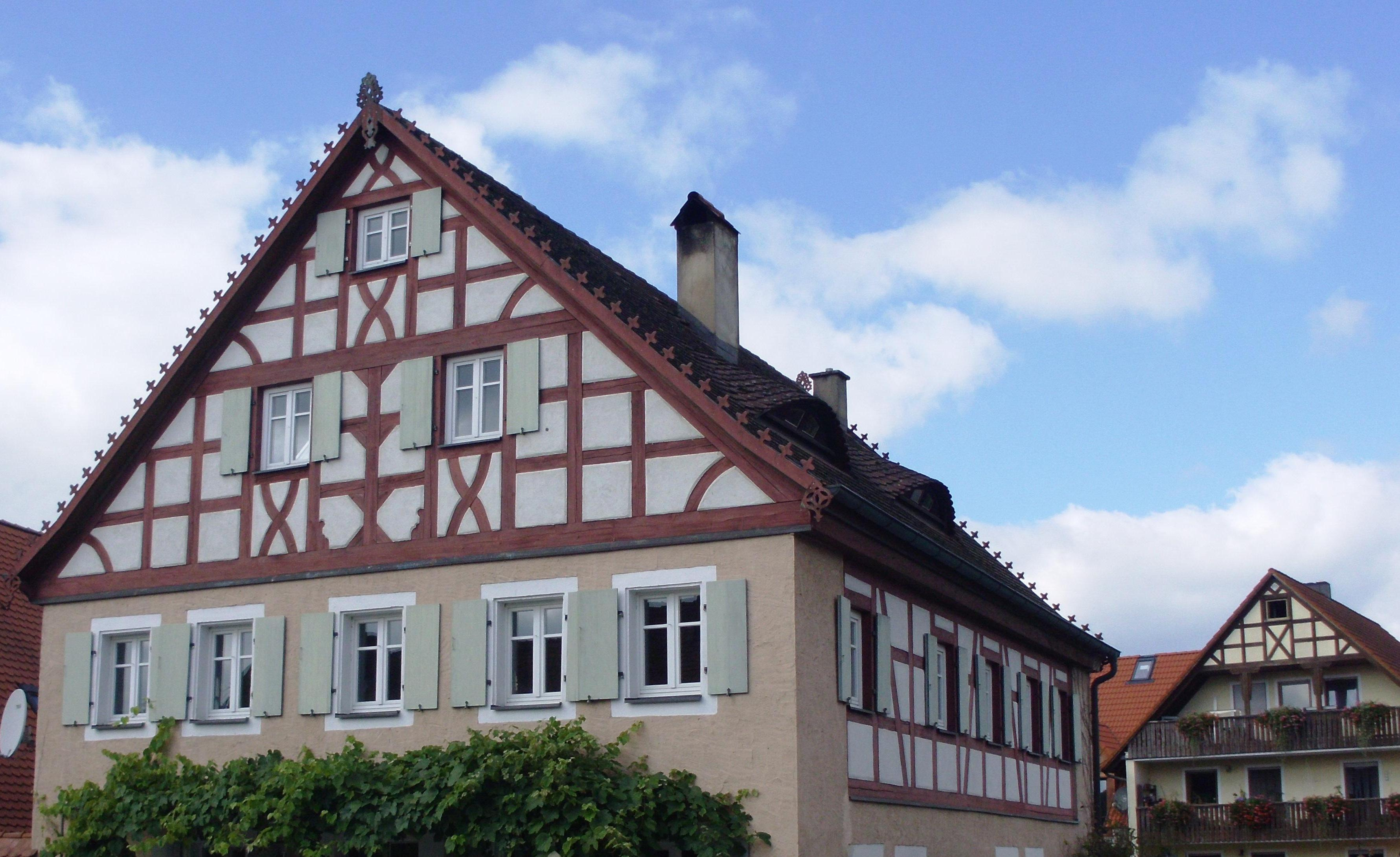 Fachwerkgiebel in Höchstetten, Ortsteil von Leutershausen im mittelfränkischen Landkreis Ansbach